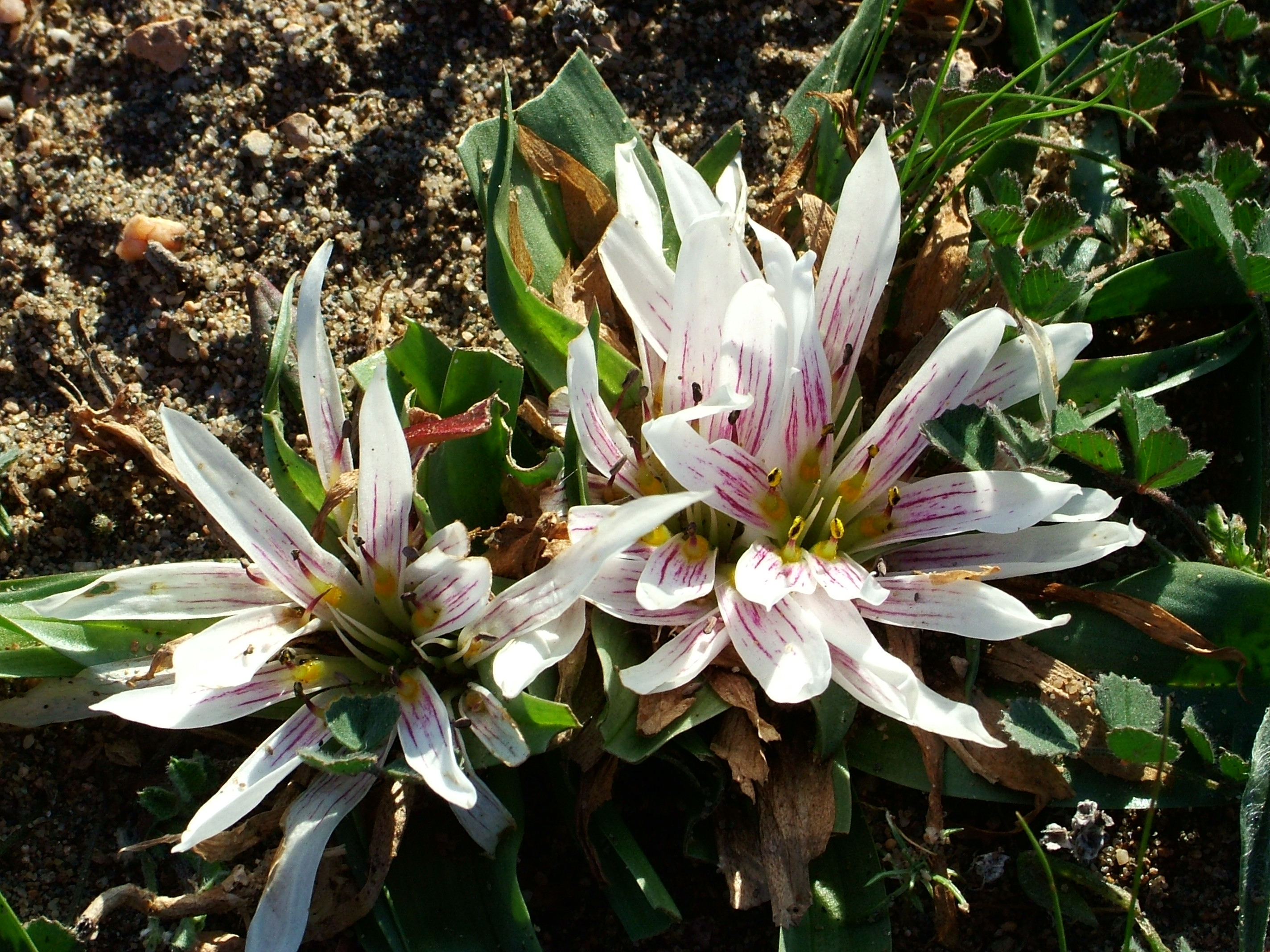 Fotografía de Androcymbium europaeum o azafrán del Cabo de Gata, tomada en Retamar, endemismo de la provincia de Almería, España.